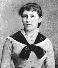 Portrait der deutschen Schriftsstellerin Paula Dehmel in jungen Jahren.